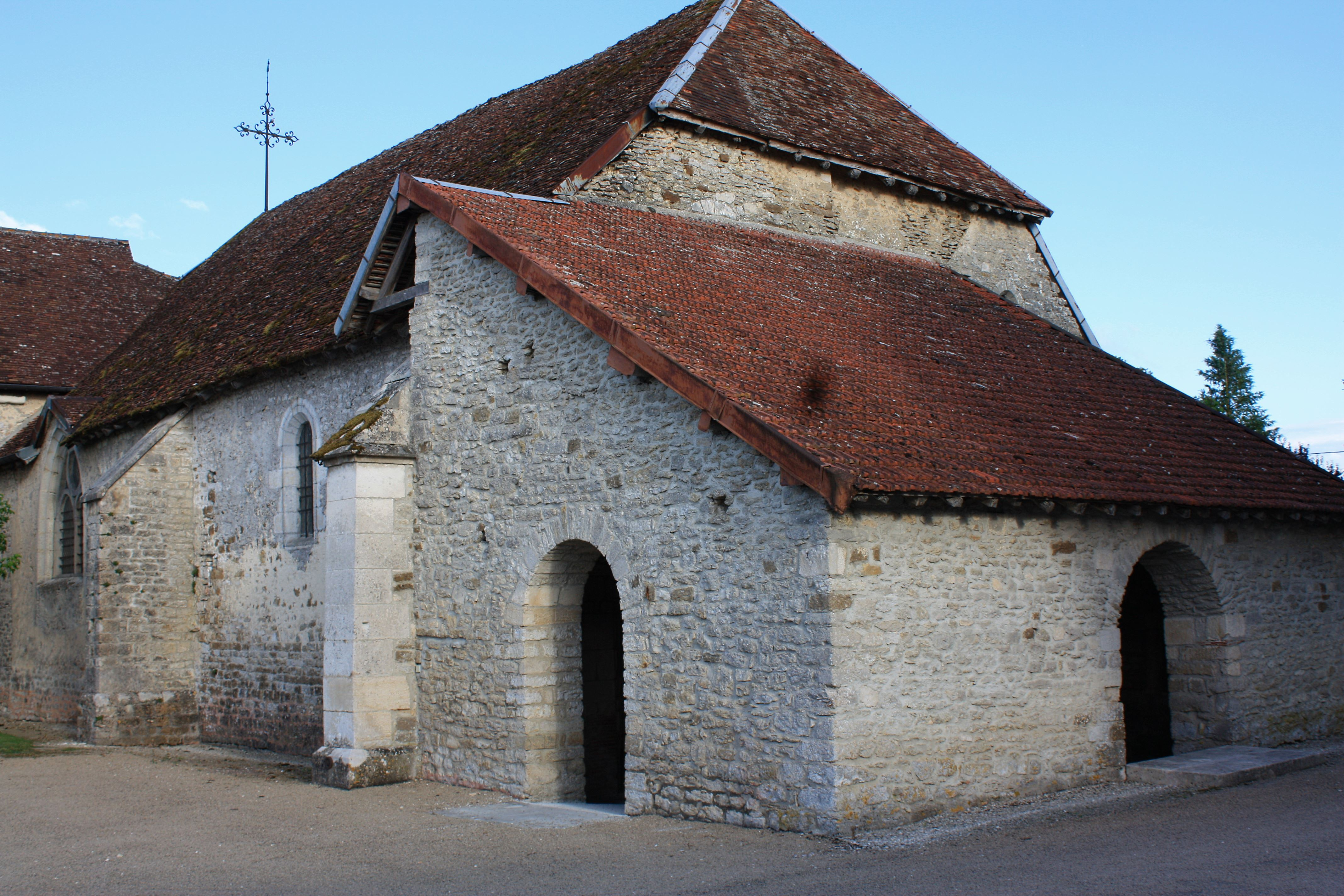 Virey-sous-Bar - église Vue générale au Nord-Oust